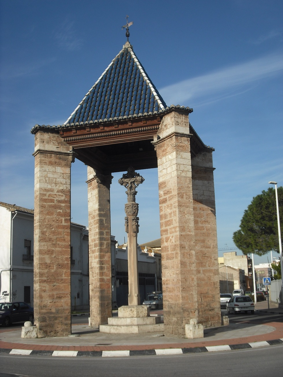 Creu coberta (cruz cubierta) de Almácera